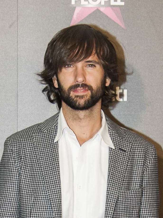 Fotos del photocall y fiesta de lanzamiento de un nuevo canal de televisión en España.